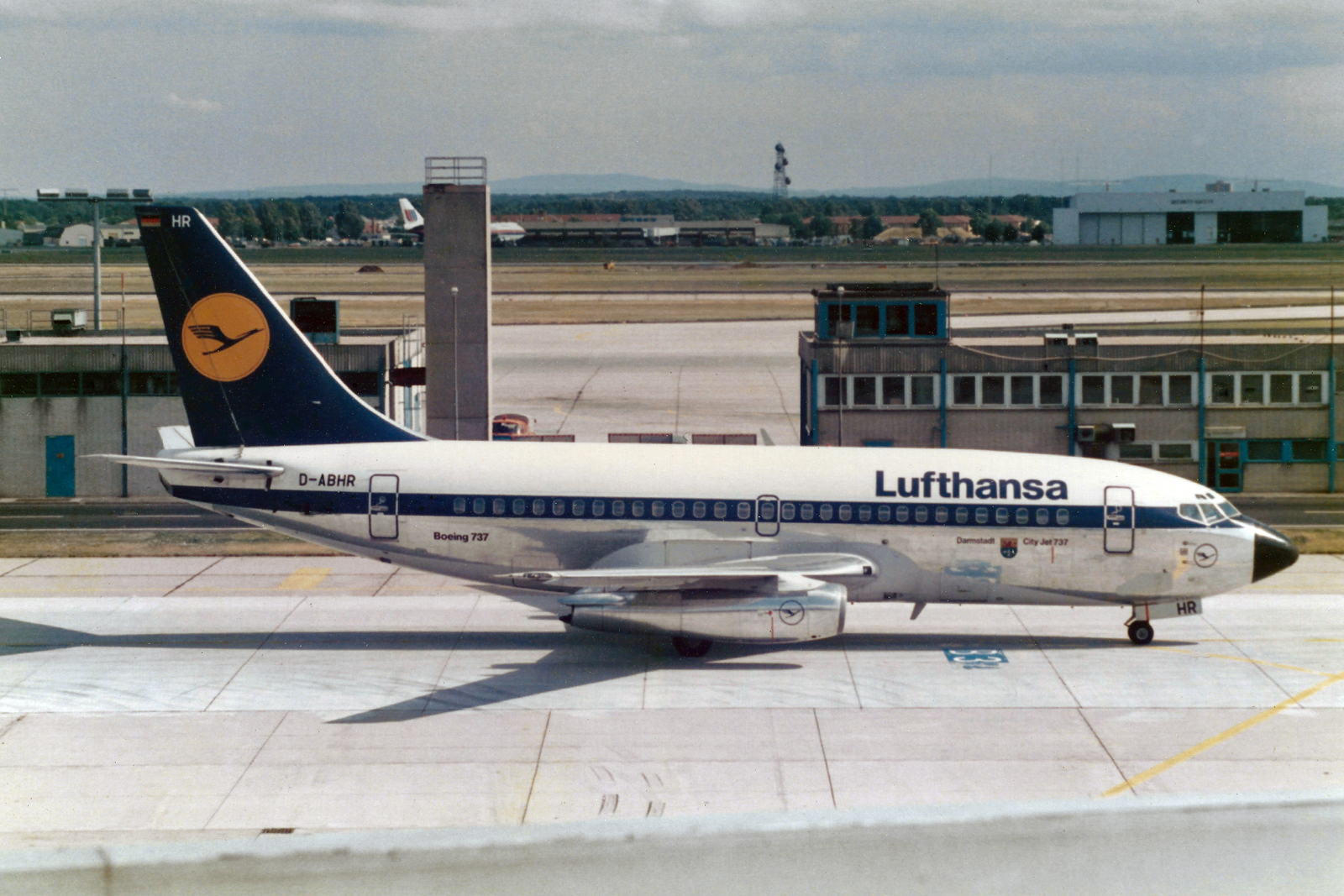 Frankfurt am Main (Rhein-Main AB) (FRA / EDDF / FRF) Germany 7.1985